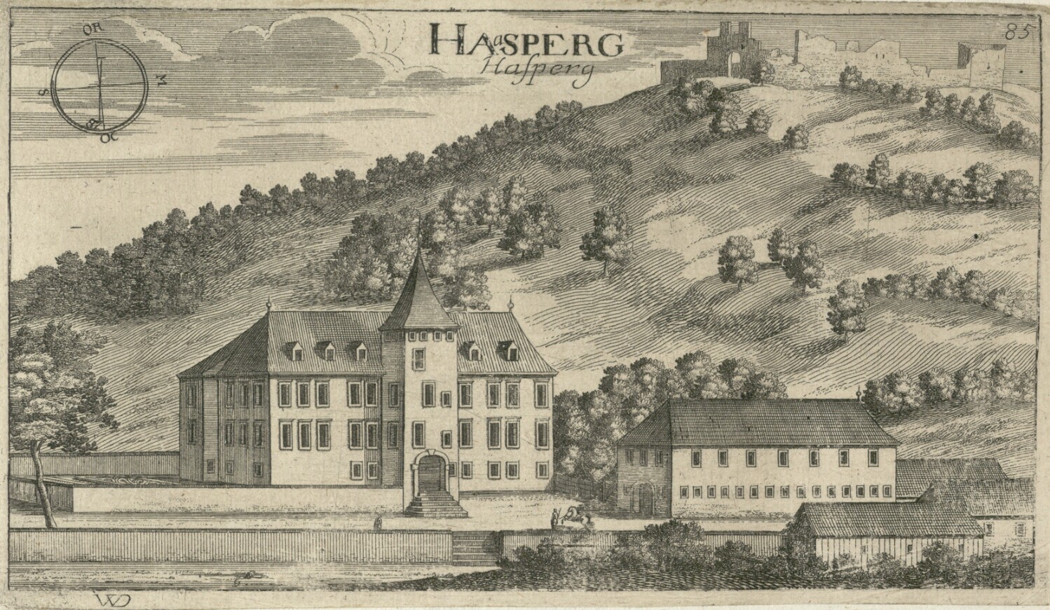 Grad in dvorec Hošperk (Haasberg)